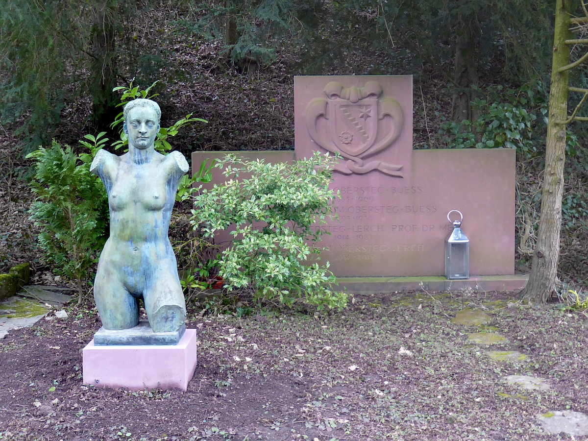 Jürg im Obersteg-Lerch (1914–1983) Pathologe, Professor Gerichtsarzt am gerichtsmedizinischen Institut in Basel, Kunstsammler Familiengrab auf dem Friedhof Hörnli, Riehen, Basel-Stadt